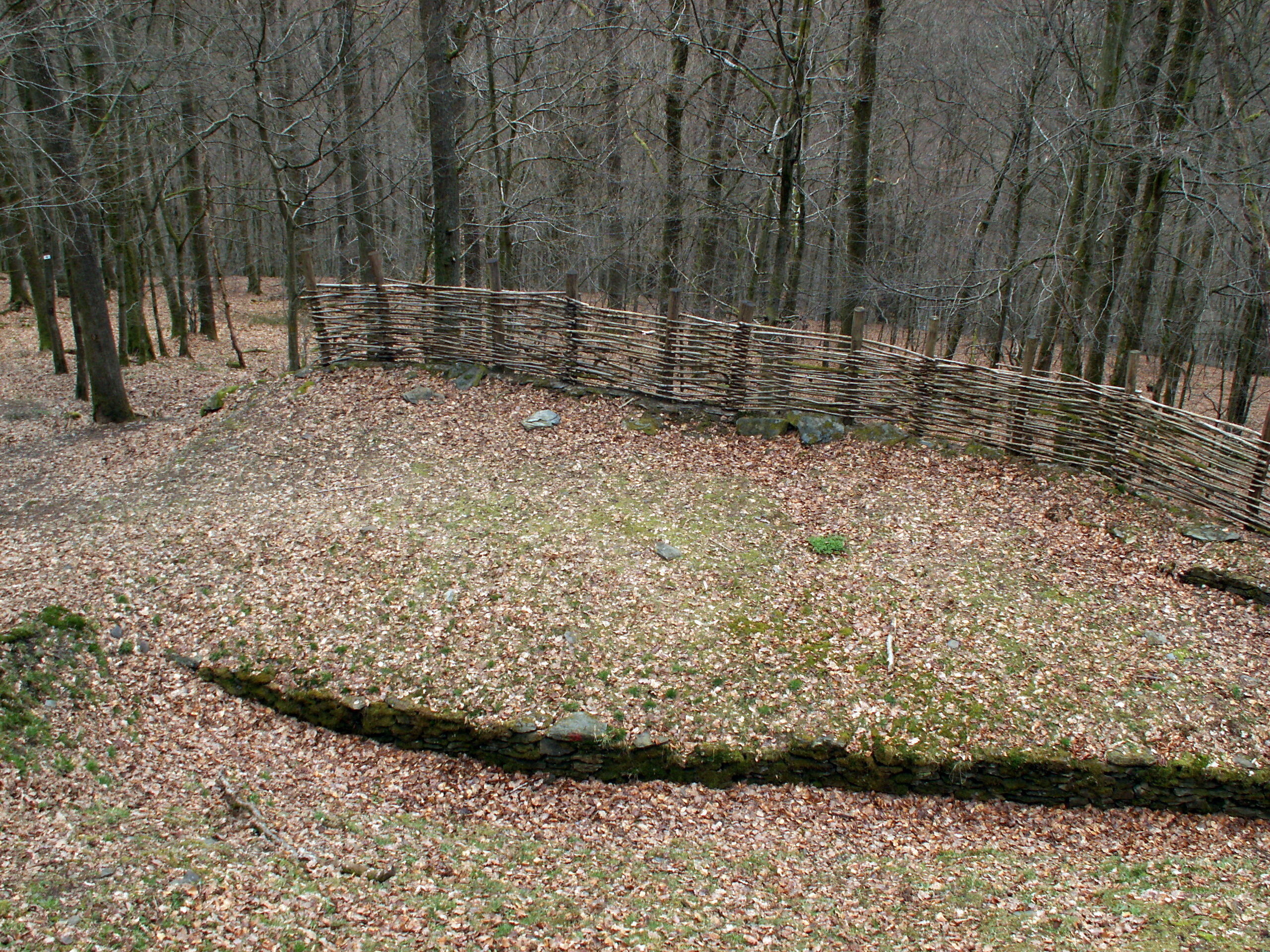 Fortification celtique de Bérisménil : seconde enceinte, reconstitution